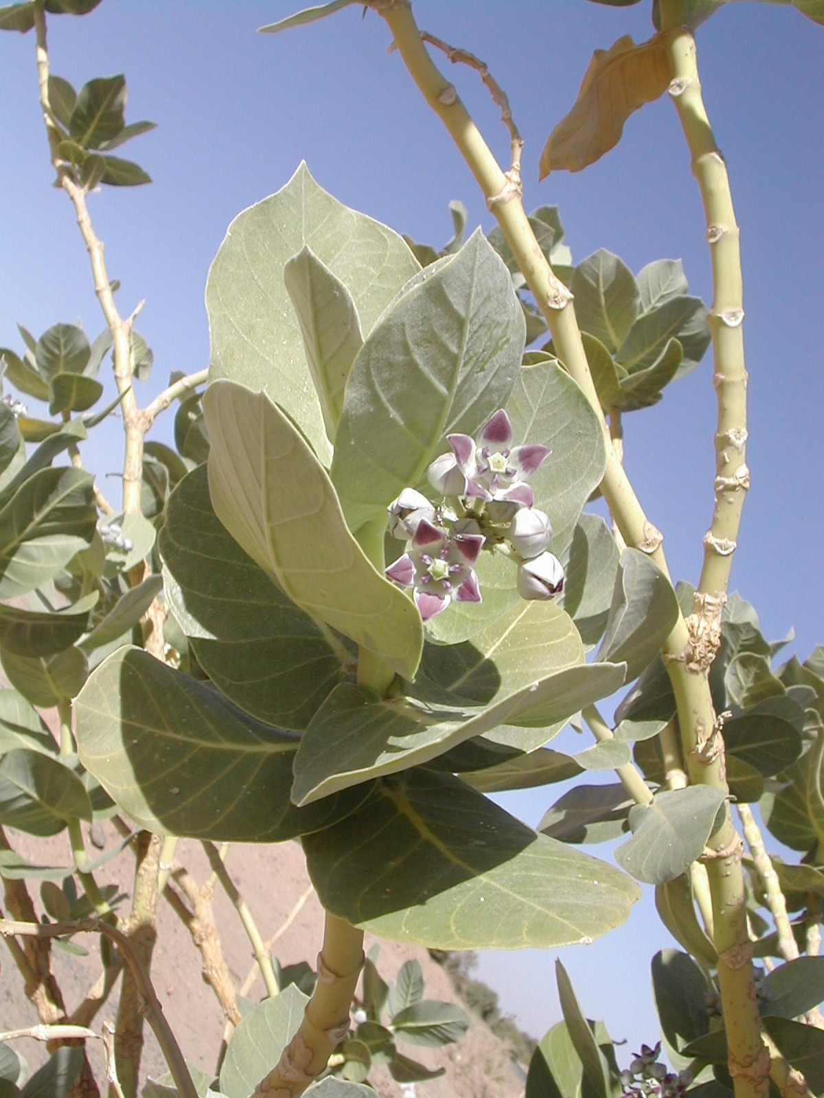 Thora Thora (Calotropis procera), Algérie